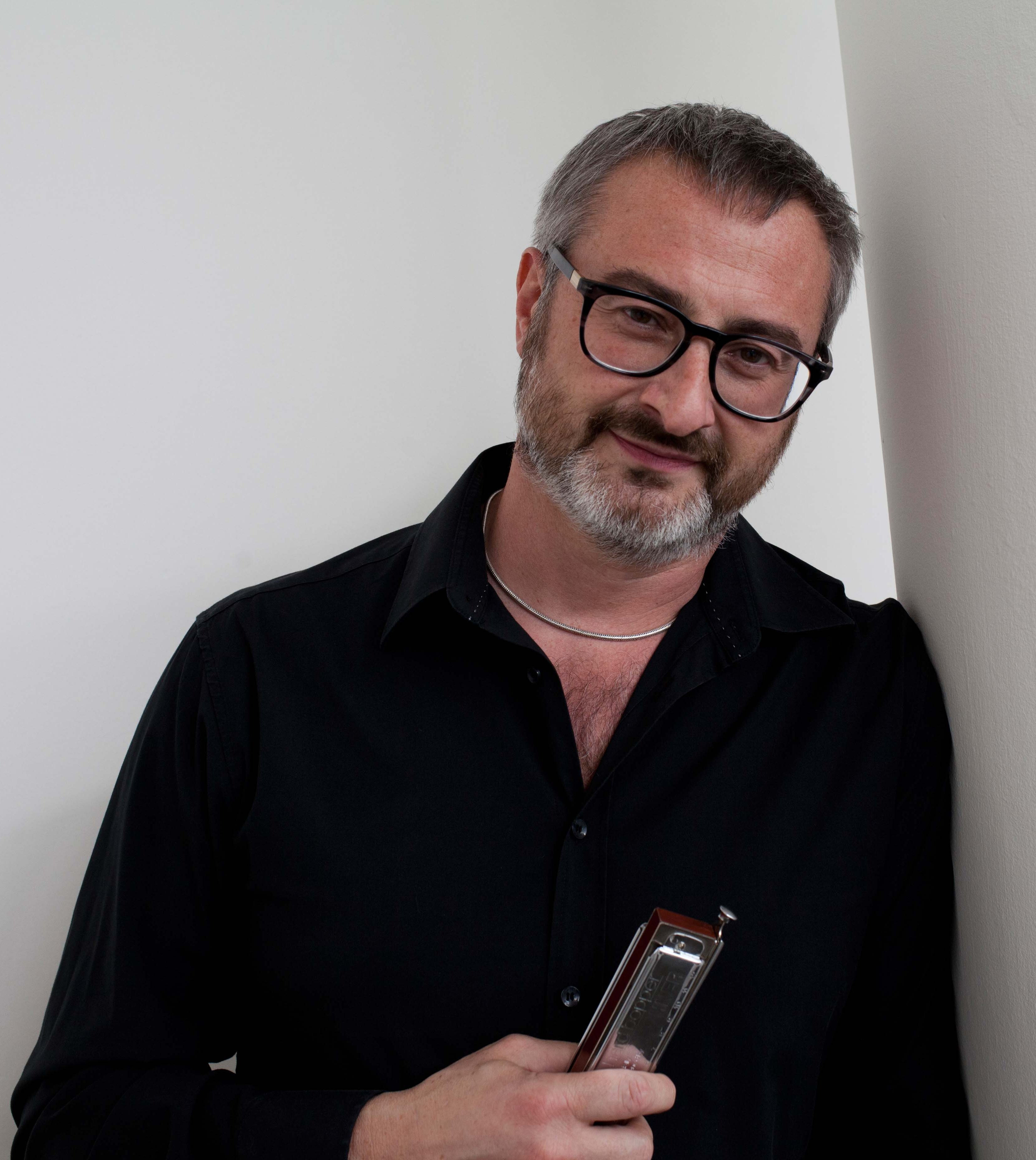 Max De Aloe - foto di Elisa Lovati